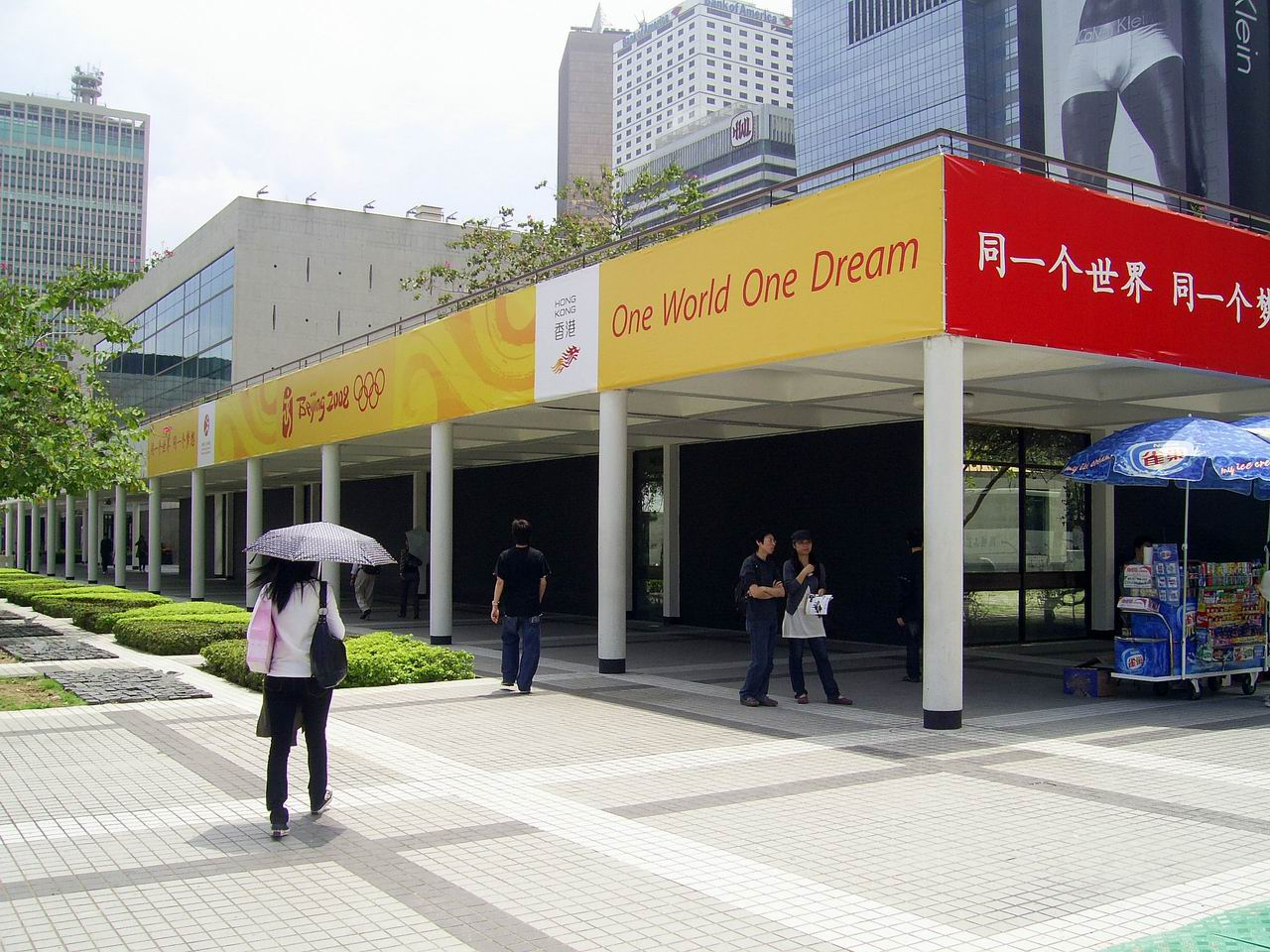 圍繞香港大會堂紀念花園的「L」形行人走廊